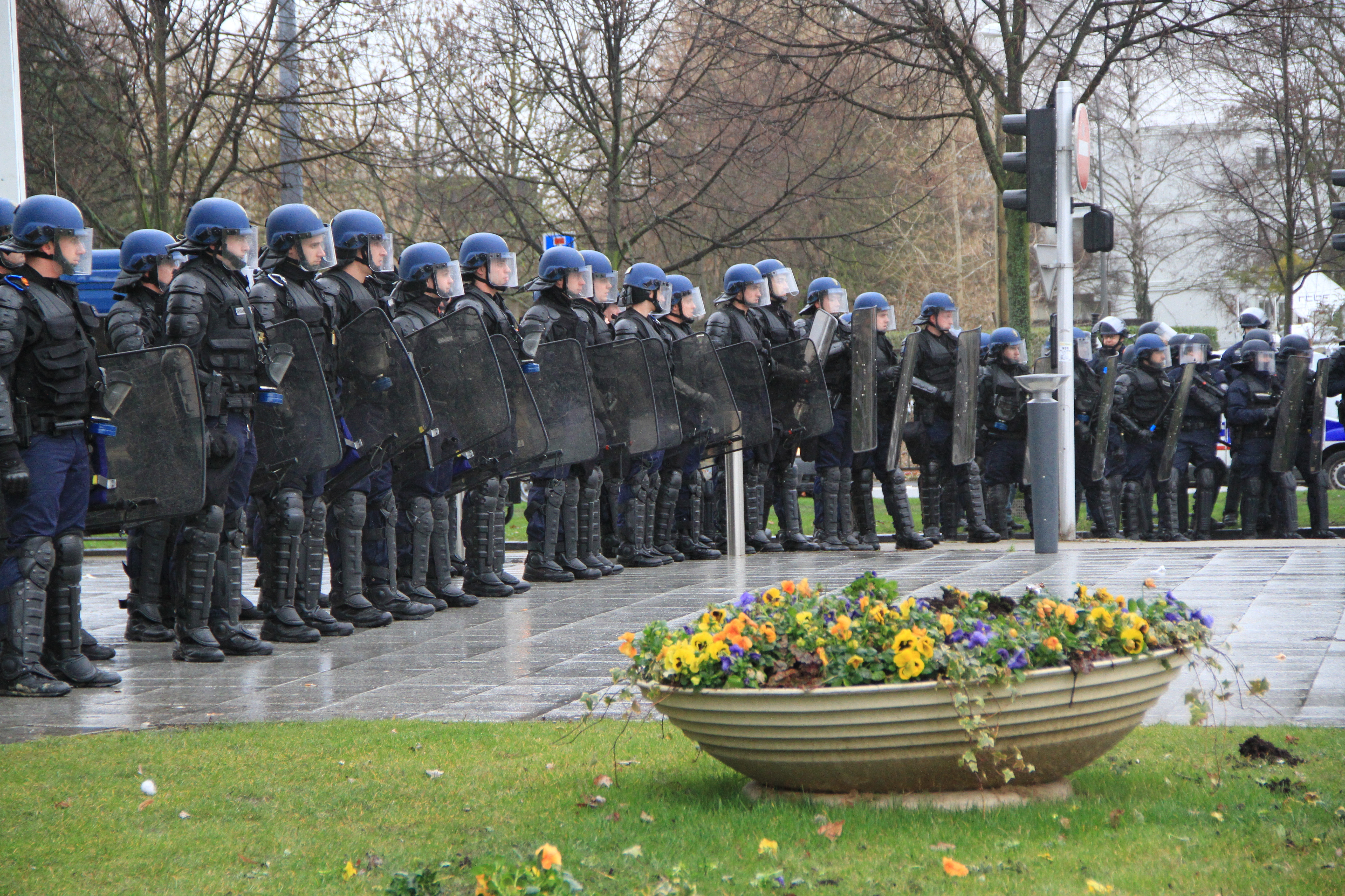 Strasbourg 6 février 2013, manifestations des ouvriers d’ArcelorMittal sur la place Adrien Zeller au Wacken.